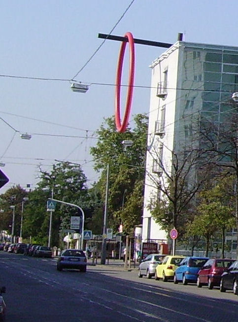 "Ring des Seyns" at the Hospital of Ludwigshafen in Rheinland-Pfalz (Germany)